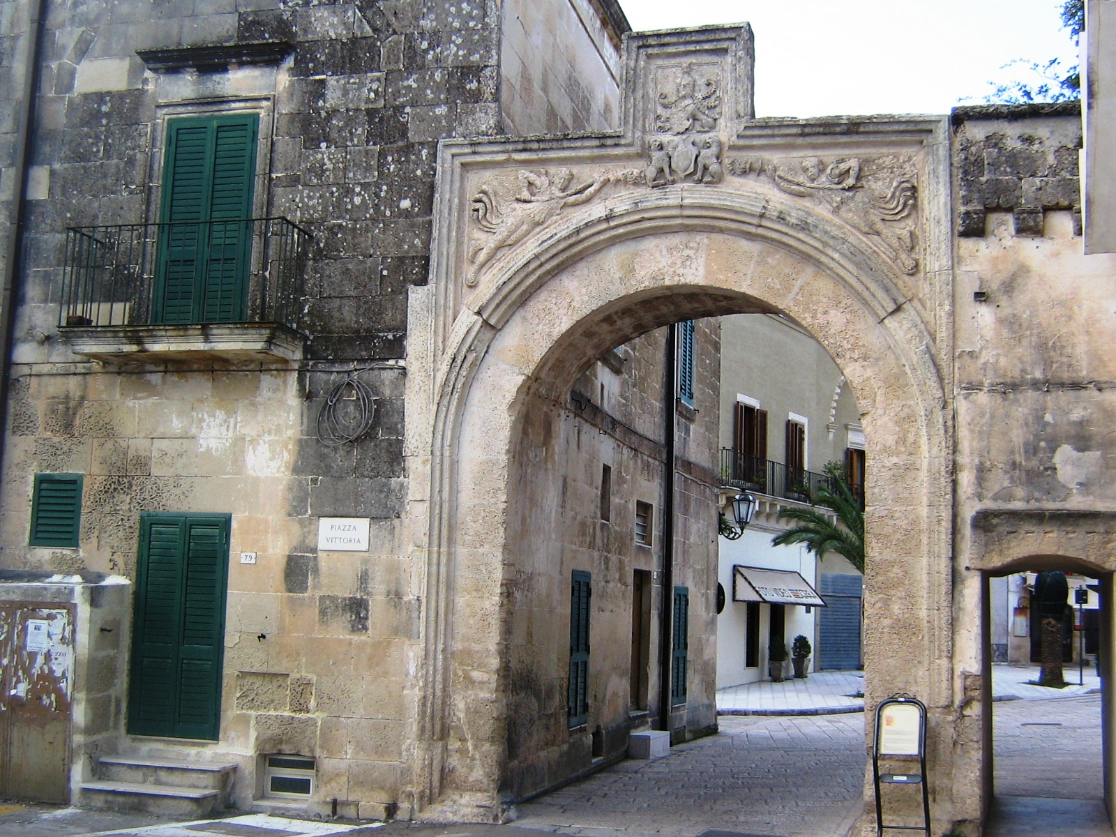 Caporta Corigliano d'Otranto